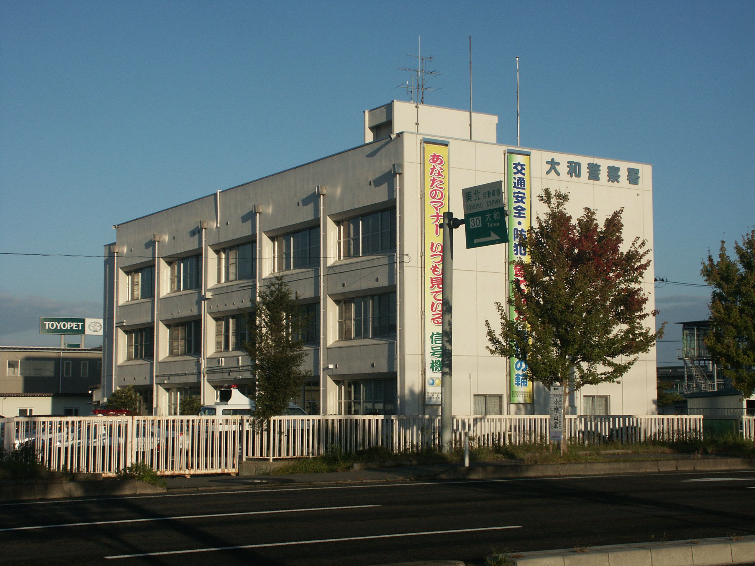 宮城県大和警察署庁舎